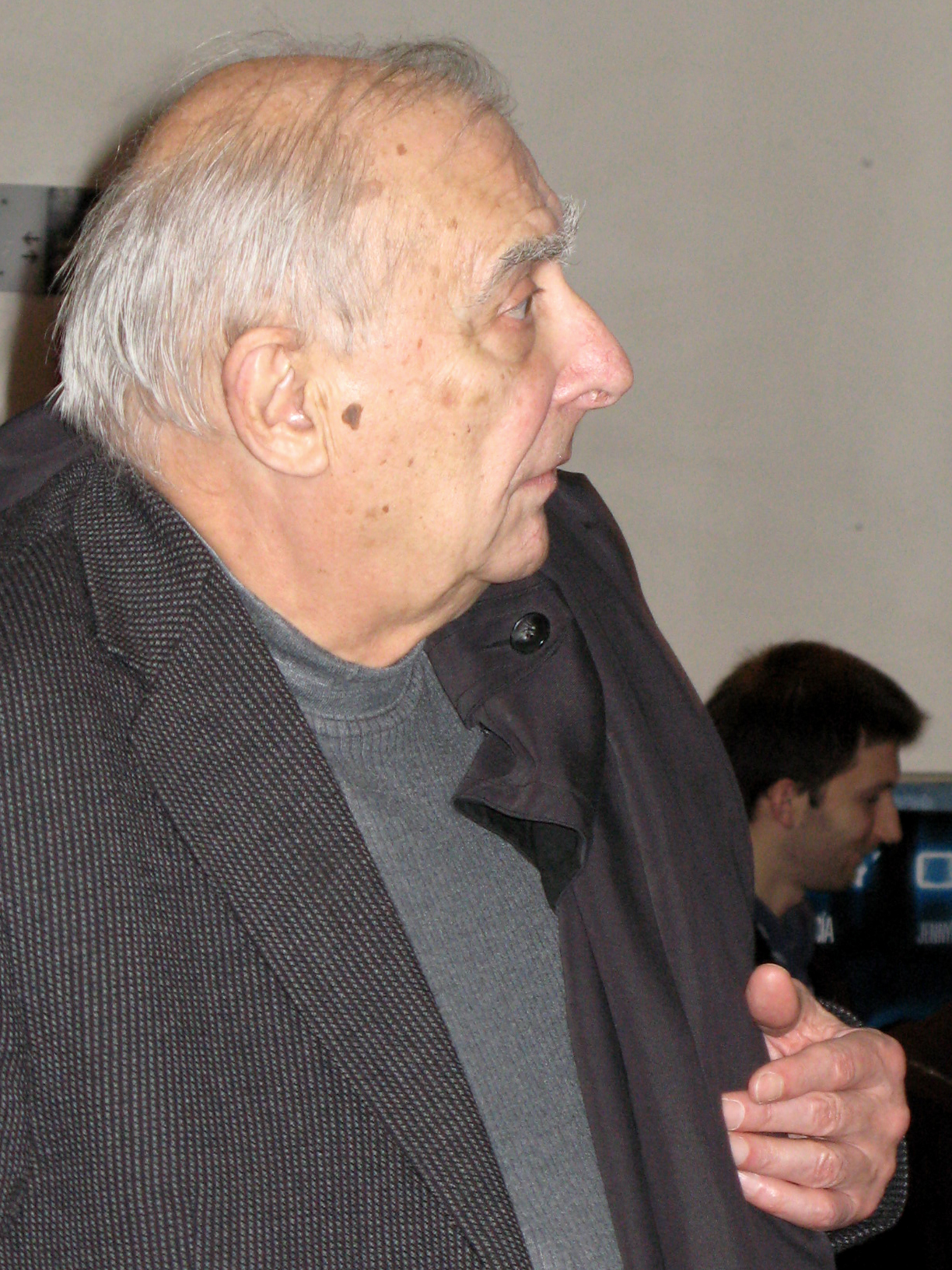 Claude Chabrol, à Amiens (Somme, France) - De passage à la "Maison de la Culture" lors du « 28ème Festival international du film d'Amiens ». .